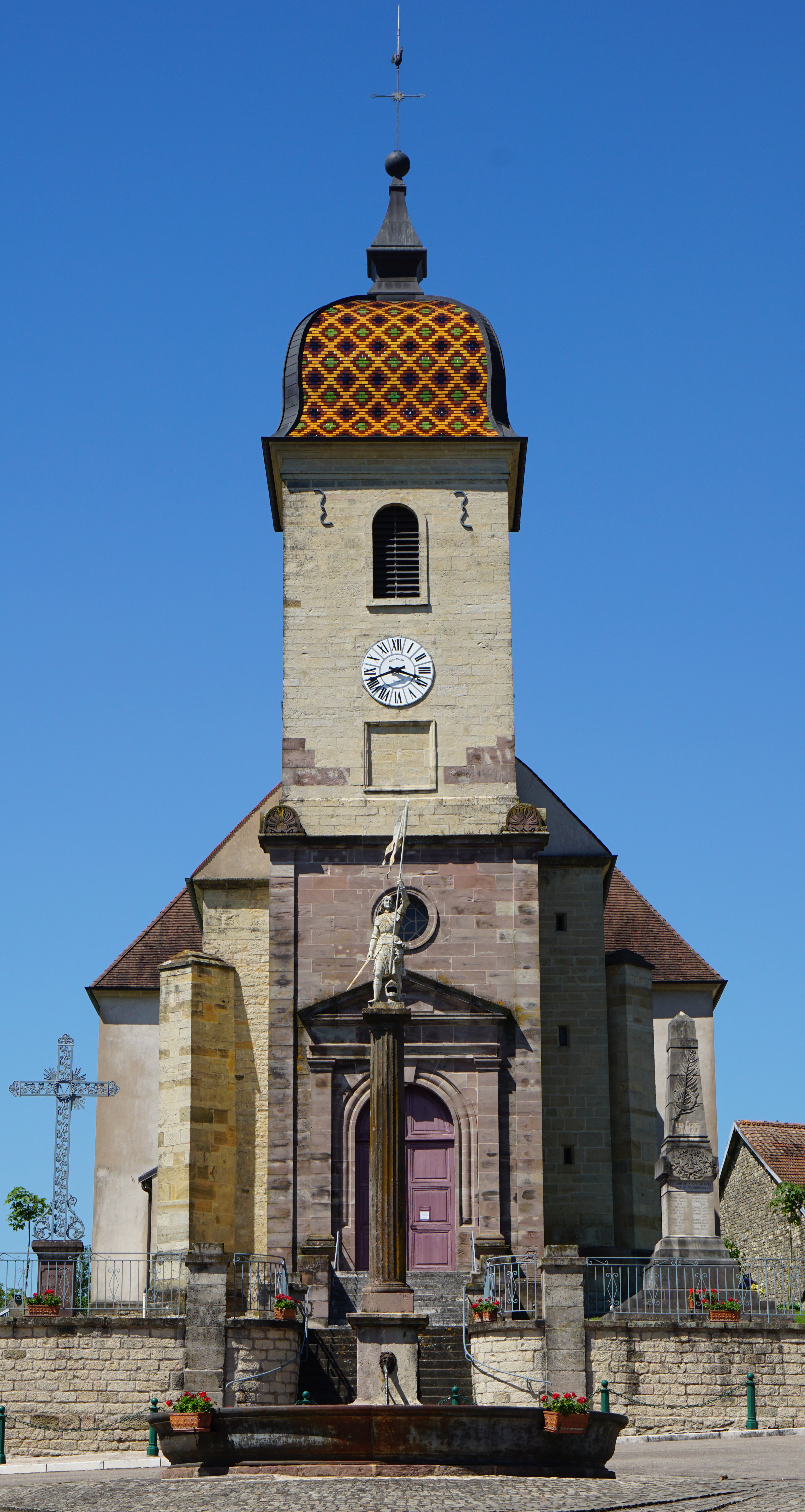 L'église de Genevrey.